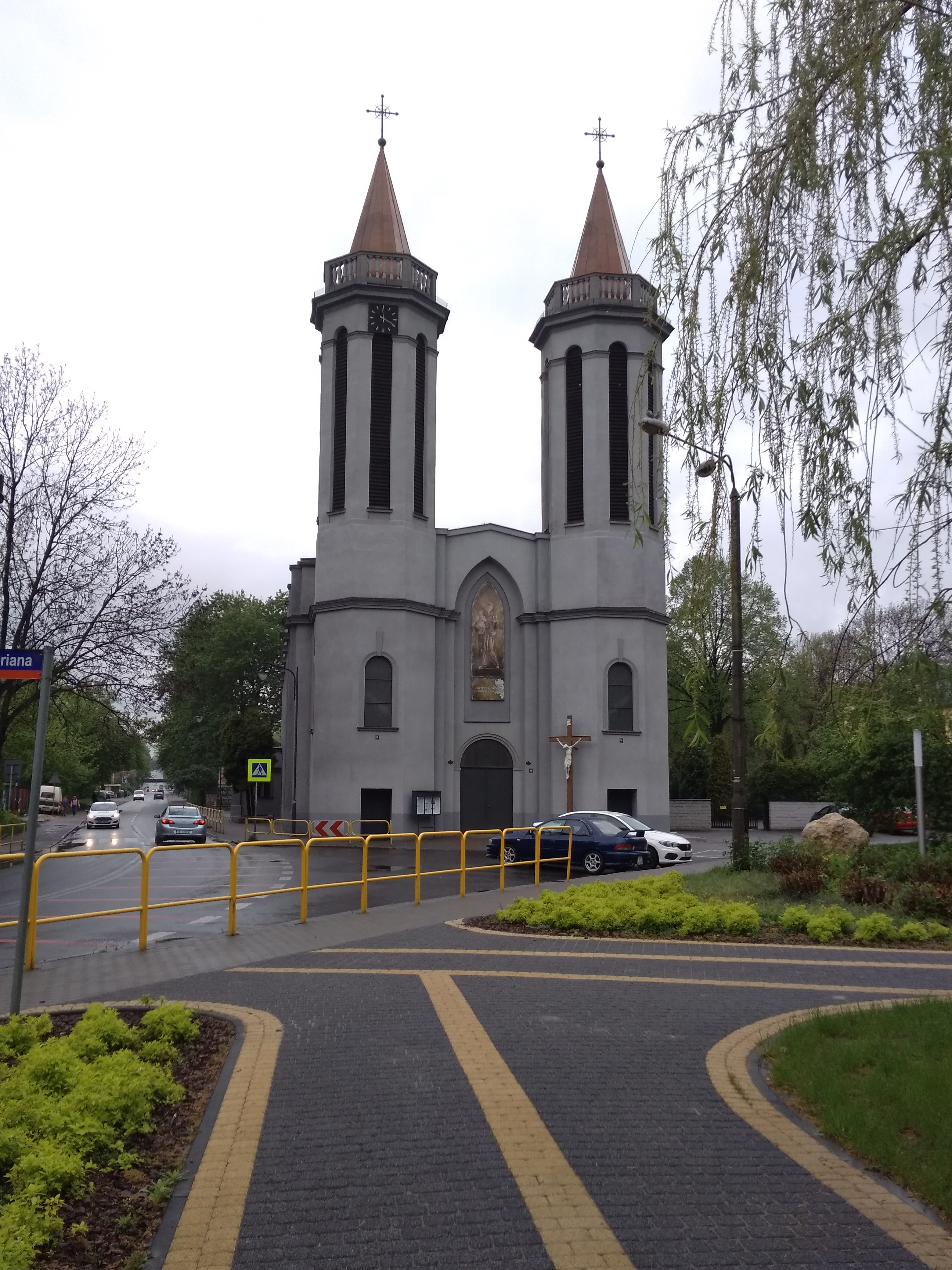 Kościół sw. Antoniego z Padwy w Siemianowicach Śląskich